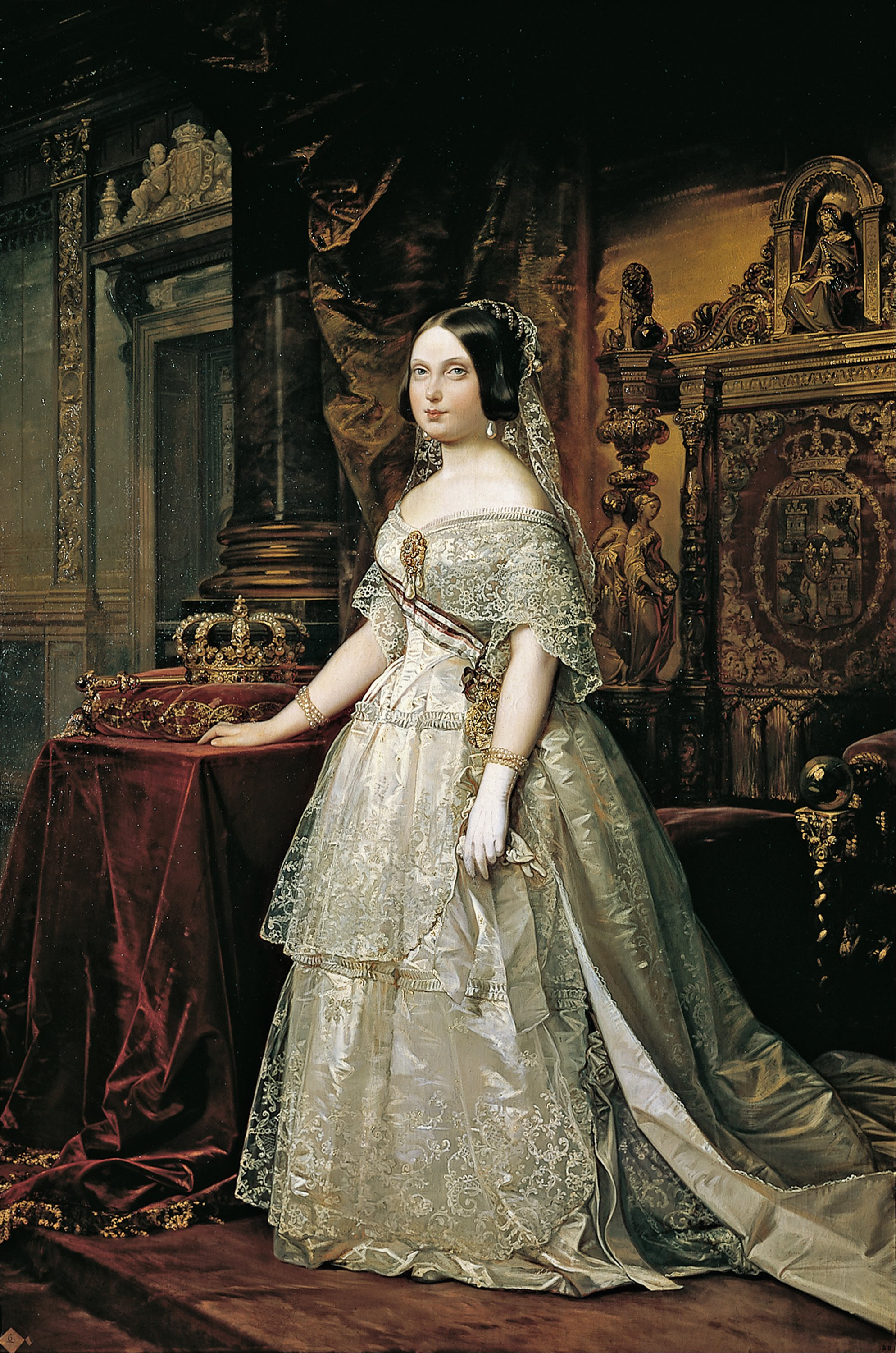 Retrato de la reina Isabel II de España (1830-1904), que fue reina de España desde 1833 hasta 1868 y era hija del rey Fernando VII de España y de María Cristina de Borbón-Dos Sicilias.